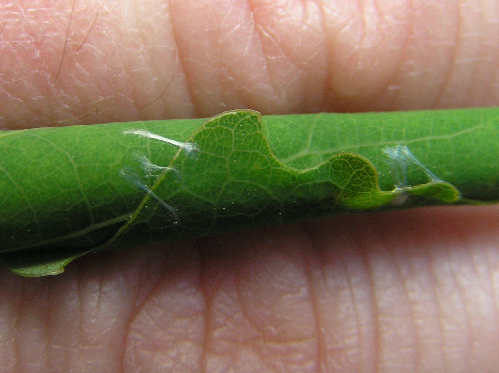 Anacampsis populella, Polska